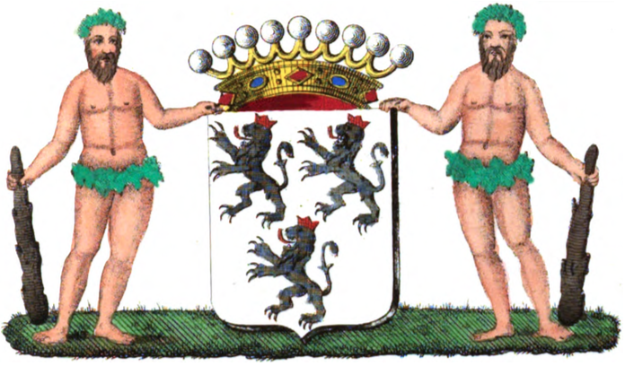 Armoiries de la famille de Creeft